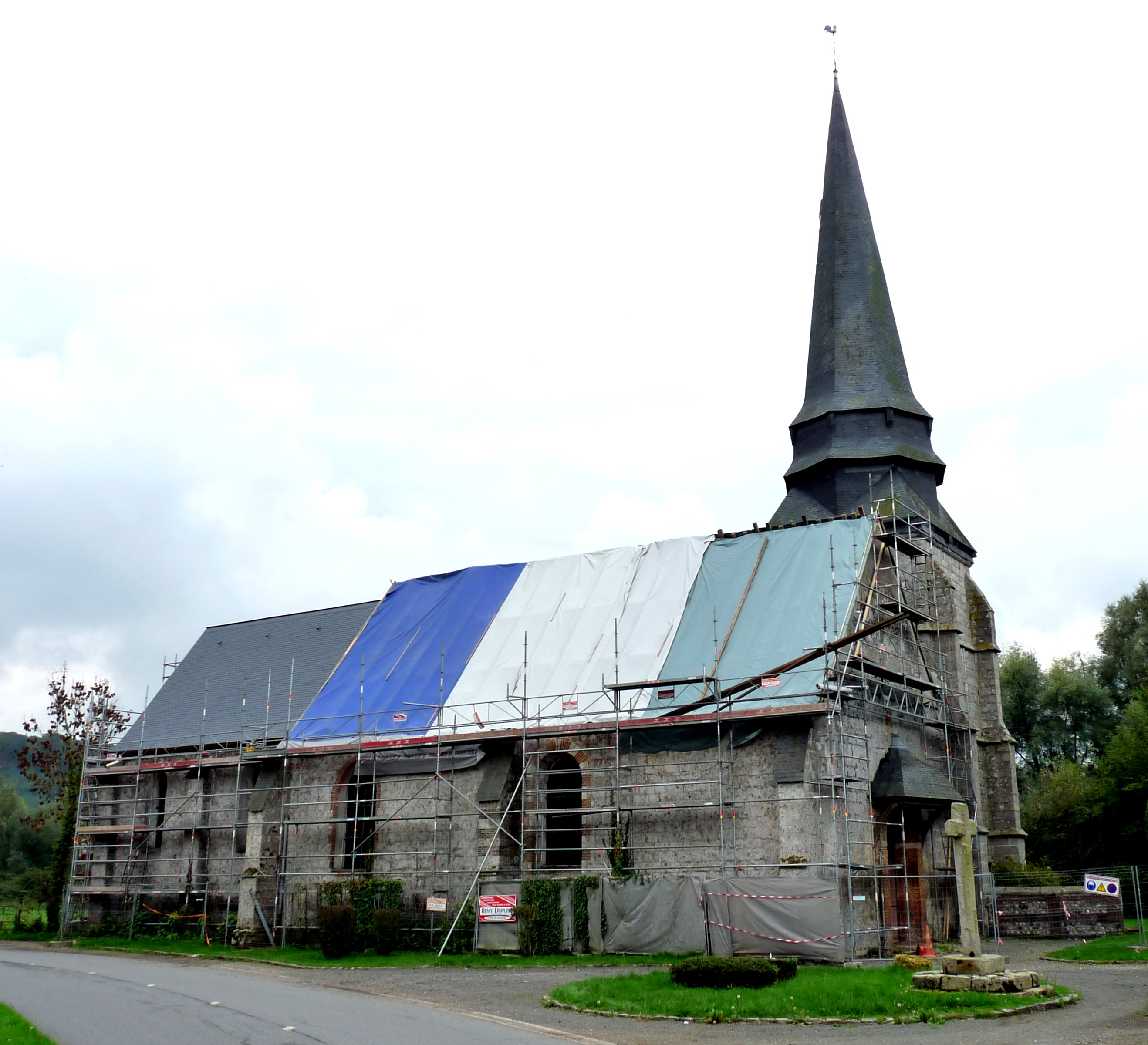 Église Saint-Pierre de Muchedent .